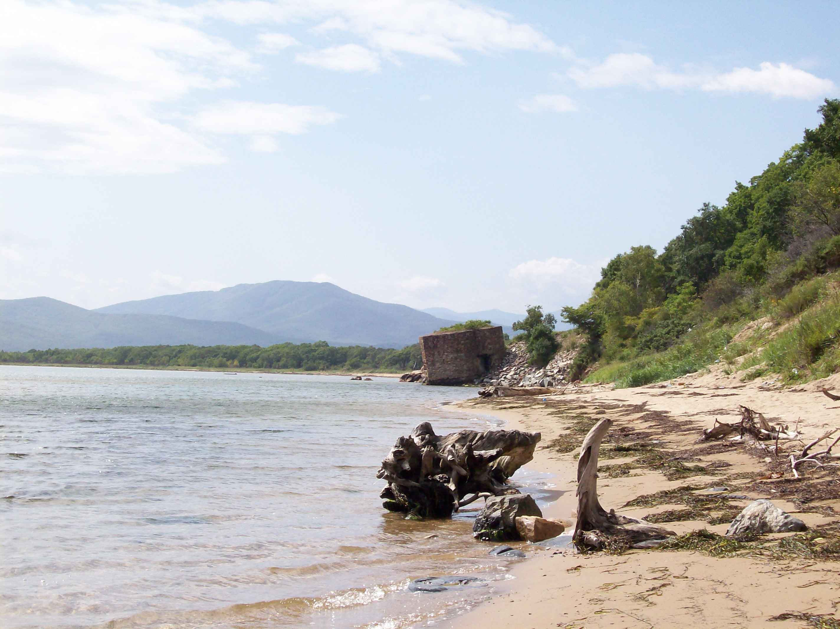 ДОТ времён Второй Мировой войны в заливе Ольга